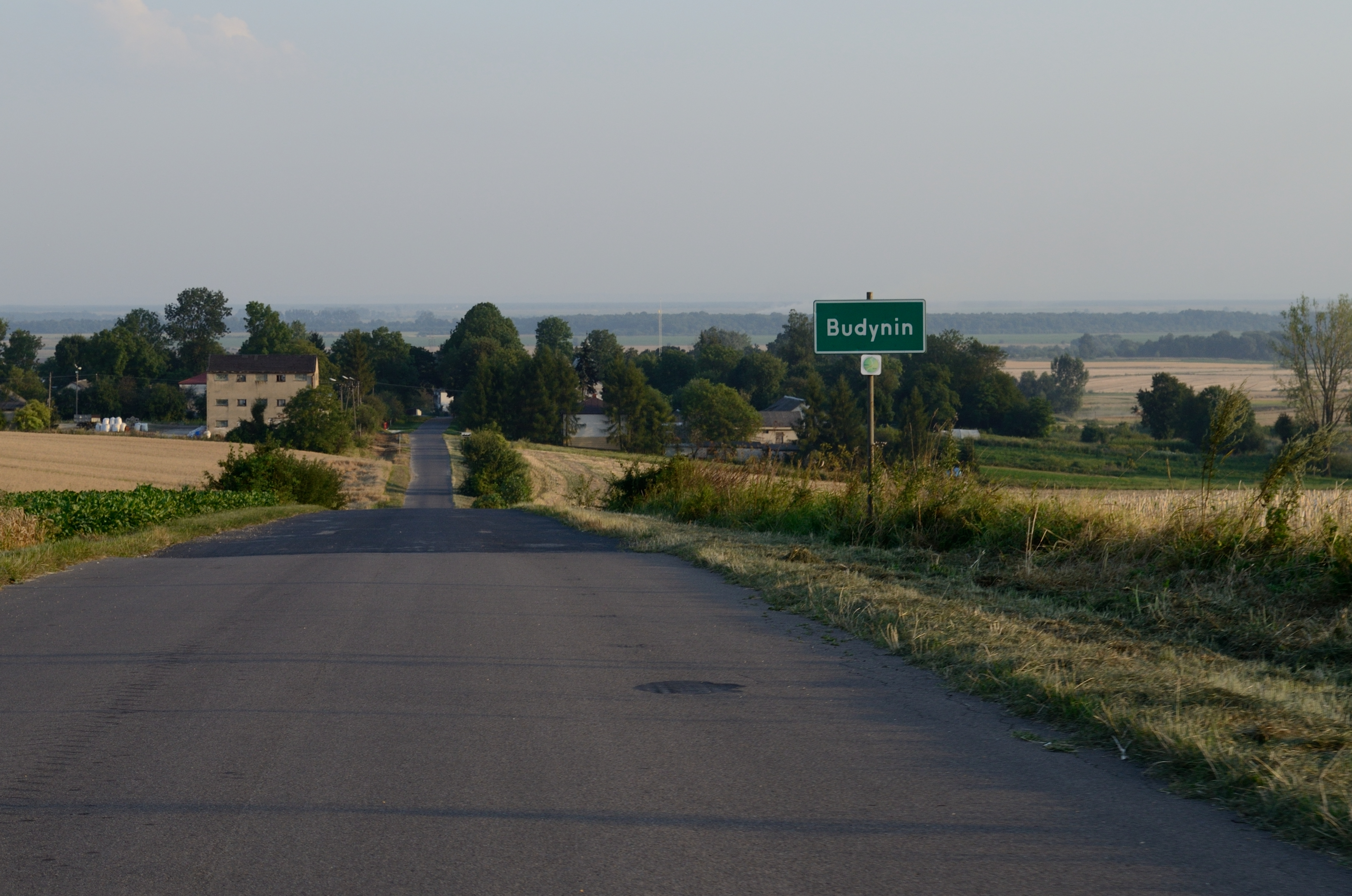 Hranice vesnice v obci Budin, Polsko